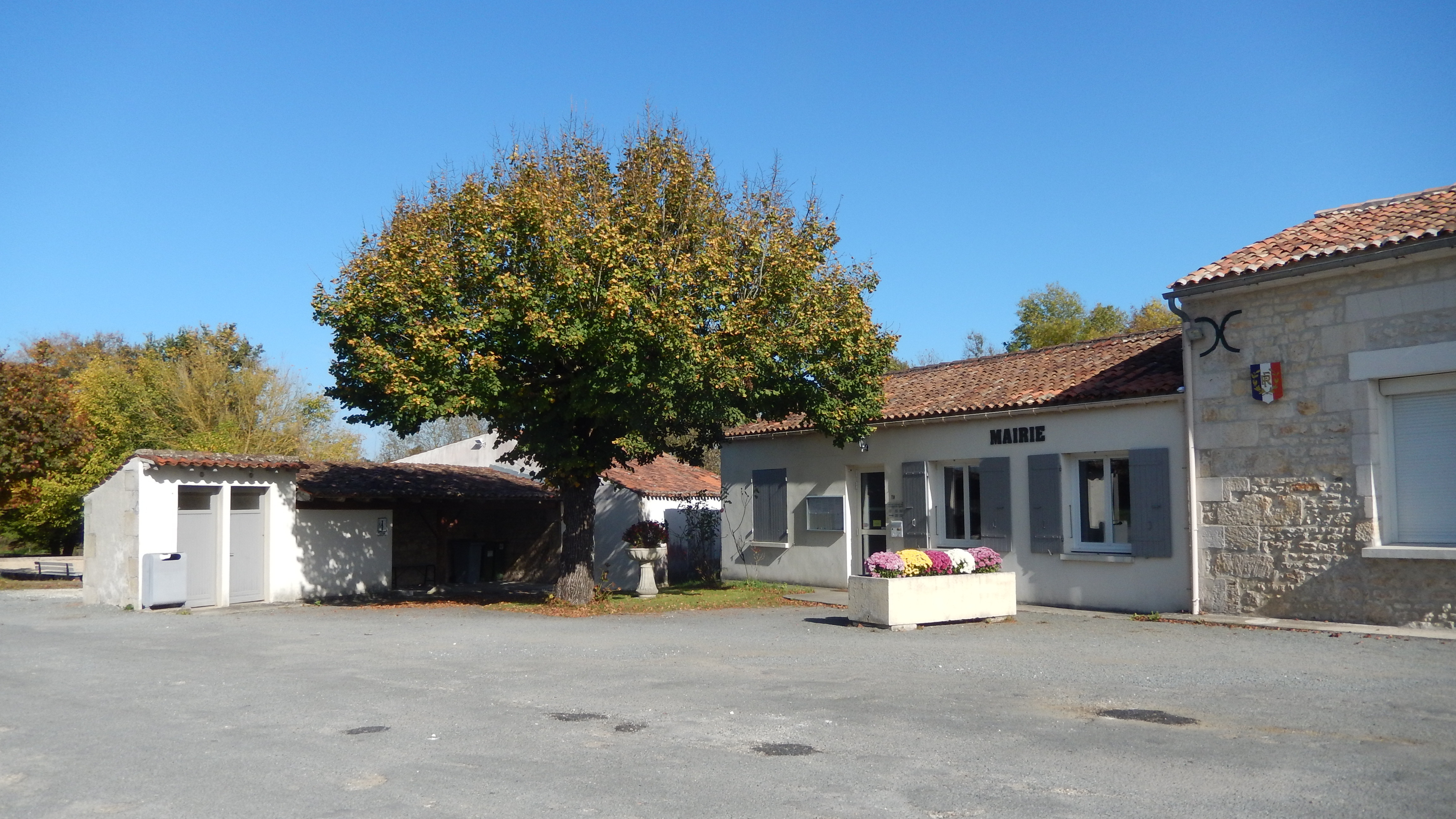 La mairie de la commune de la Clisse, située en Charente-Maritime (France).